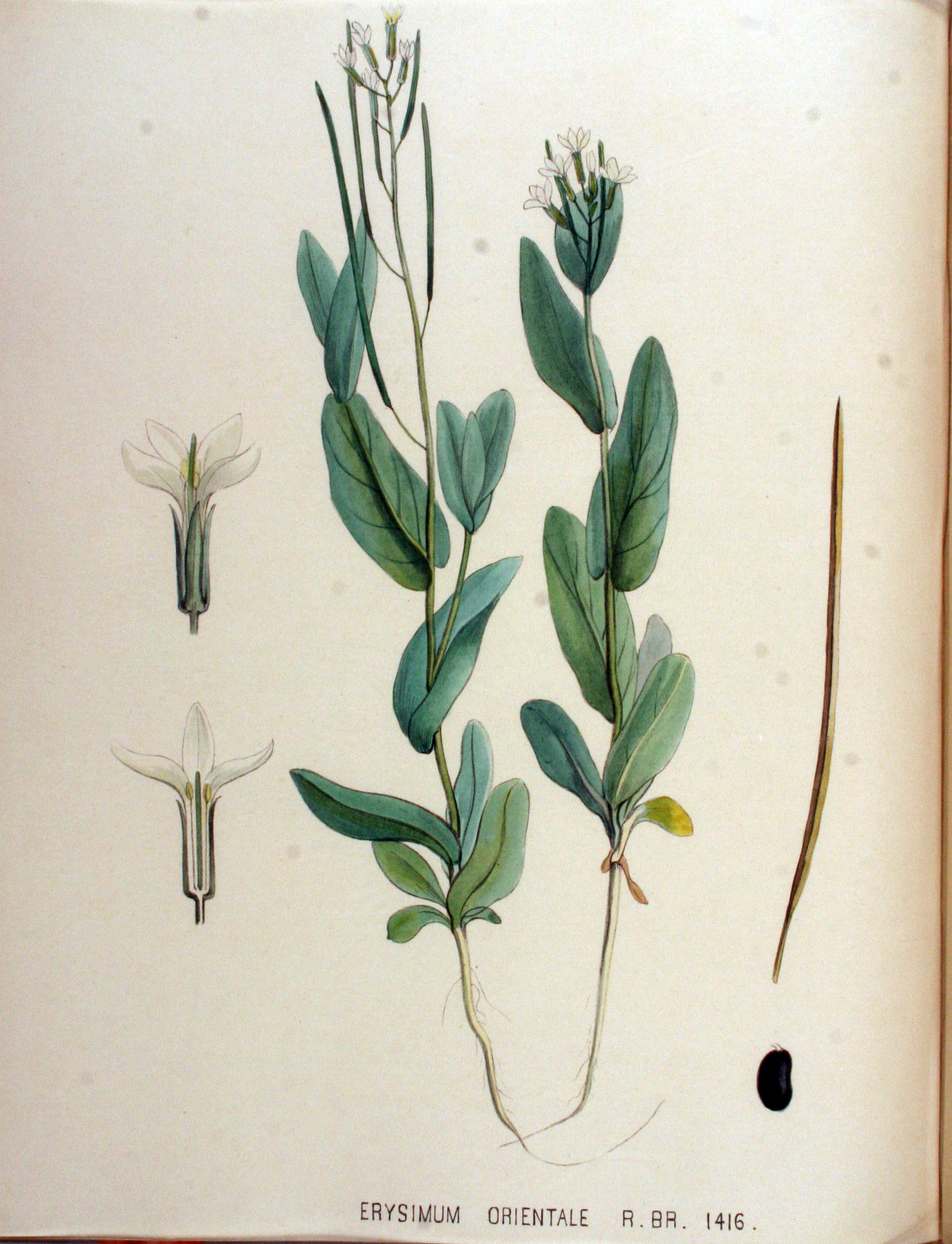 Conringia orientalis (L.) Dum. (Syn. Erysimum orientale (L.) R. Br.)